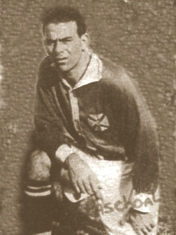 Paschoal, atacante do Vasco nos anos 20 e 30.